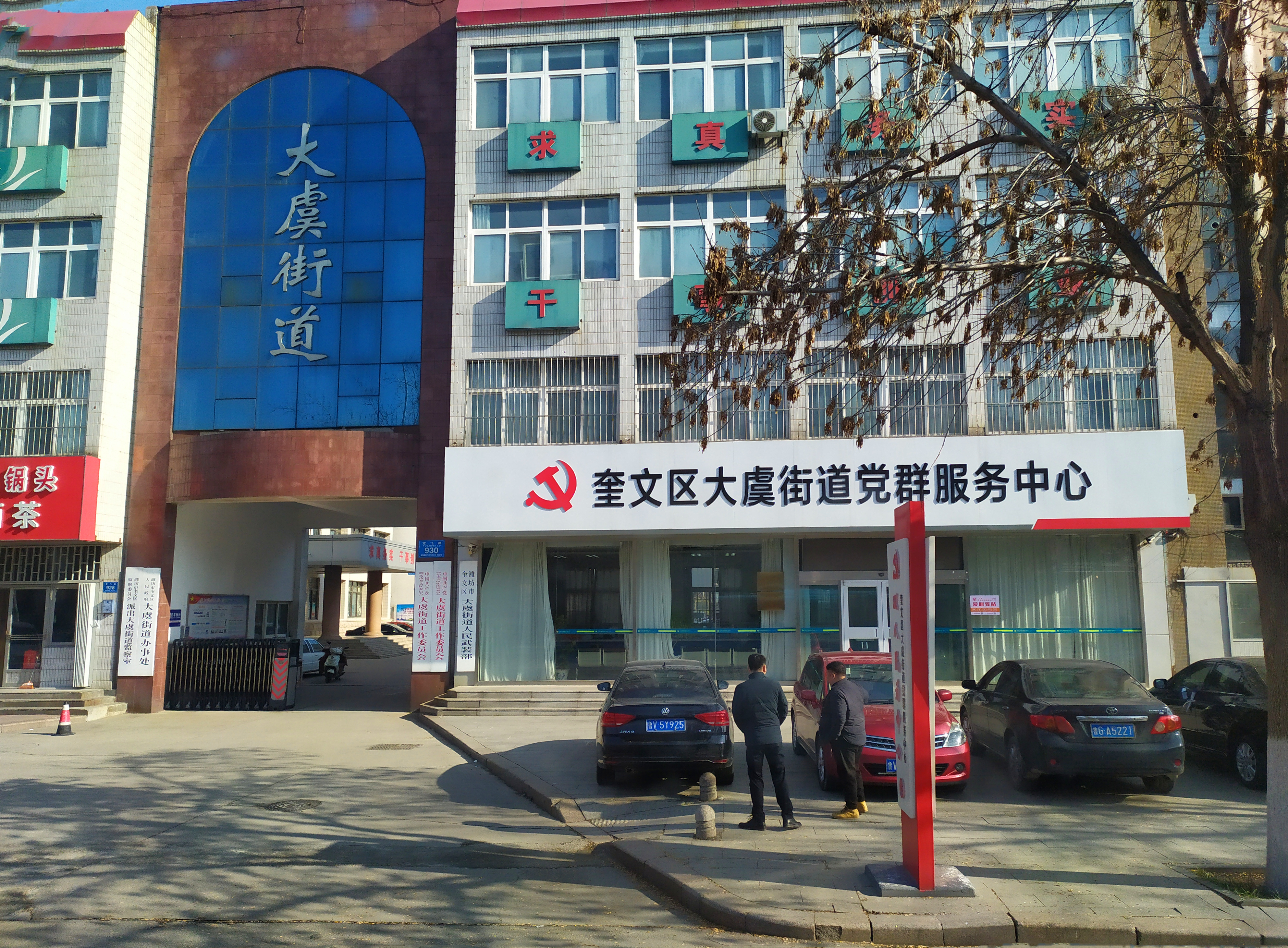 中文（中国大陆）: 大虞街道党群服务中心